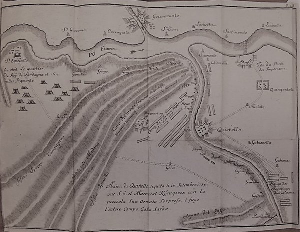 Mappa della battaglia di quistello del 15 settembre 1734 (in (1737) Memorie delli ultimi due passaggi dell'armata du S.M.C.C. in Italia contenentino ciò che di memorabile è successo in Lombardia dall'anno 1730 sino all'ano 1735. Con le carte in rame de le battaglie fra il detto tempo successe, Vienna: Paolo Straub )